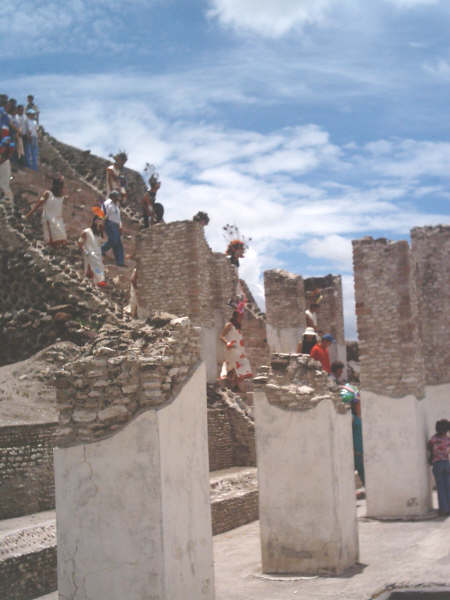 Danzantes contemporáneos descienden del Edificio A de Tula (Hidalgo)